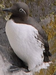 Variazione "dalle redini" dell Uria aalge aalge, fotografato agli inizi di luglio 2004 sul Látrabjarg in Islanda occidentale.